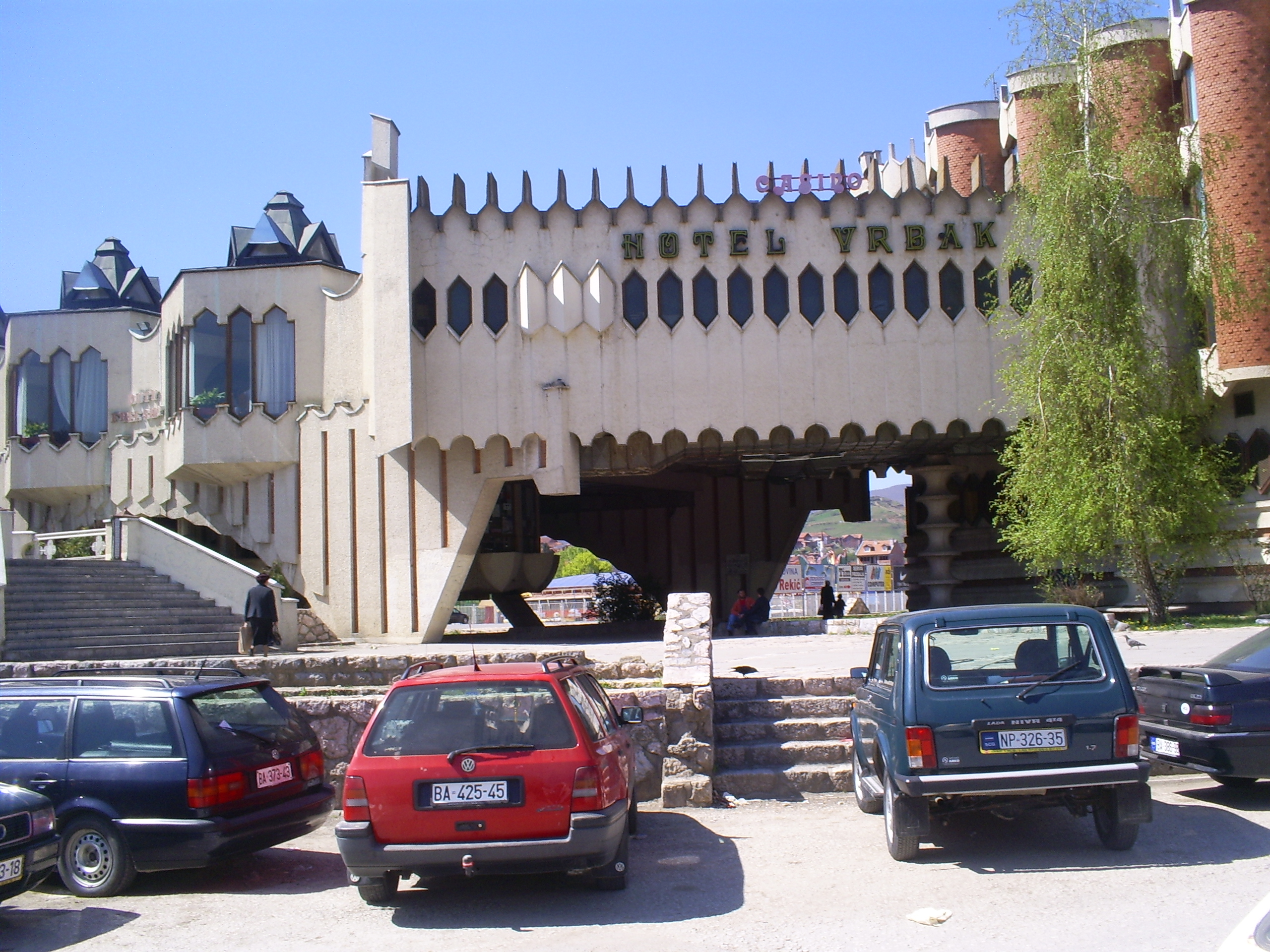 Hotel Vrbak u Novom Pazaru